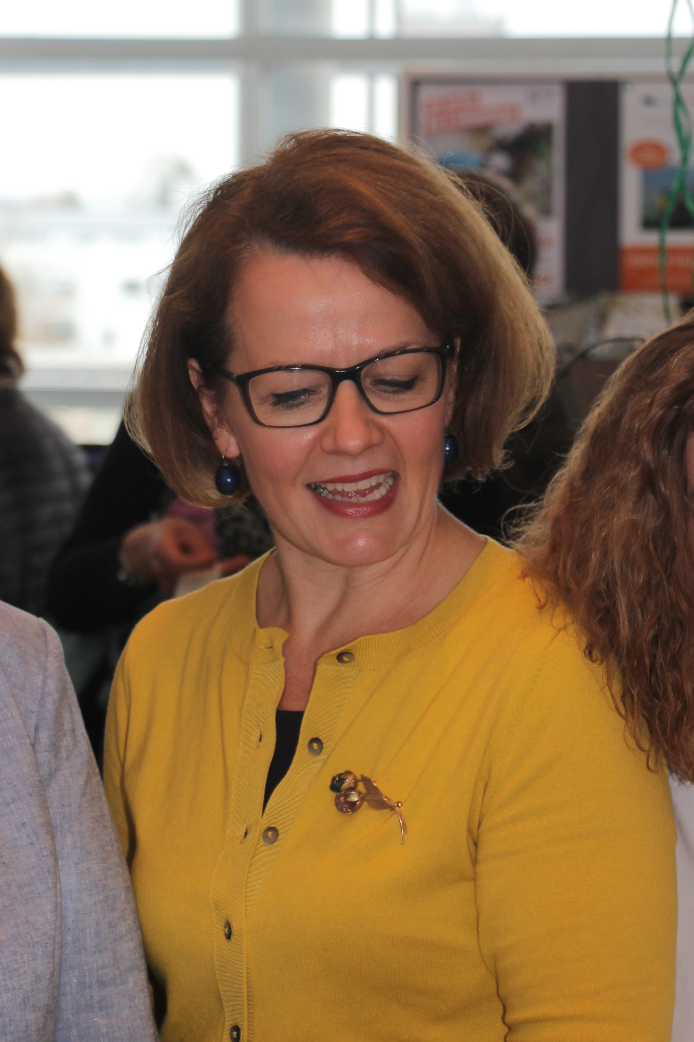 Eindrücke rund um die Freiwilligenmesse 2018 in St. Pölten; Landesrätin Christiane Teschl-Hofmeister